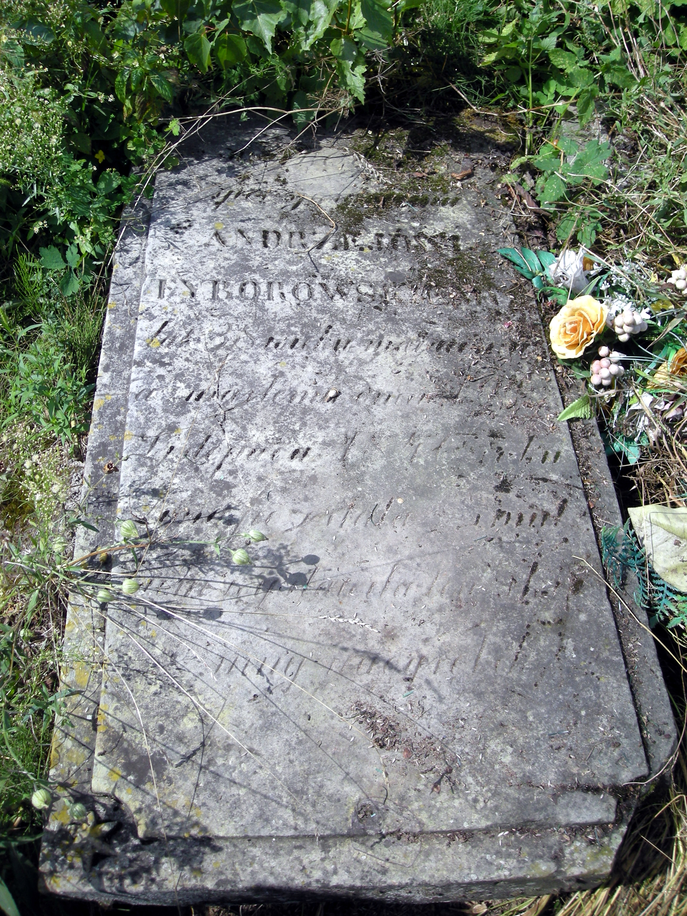 Nagrobek Andrzeja Tyborowskiego.